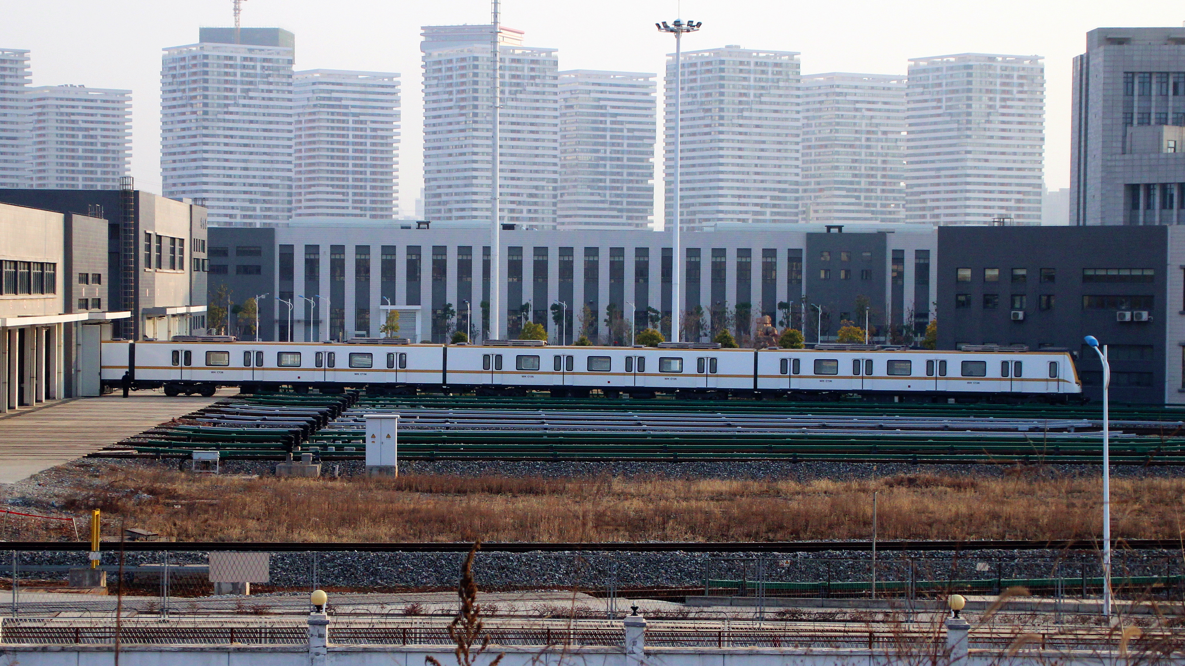 武汉轨道交通3号线列车，位于三金潭车辆段。